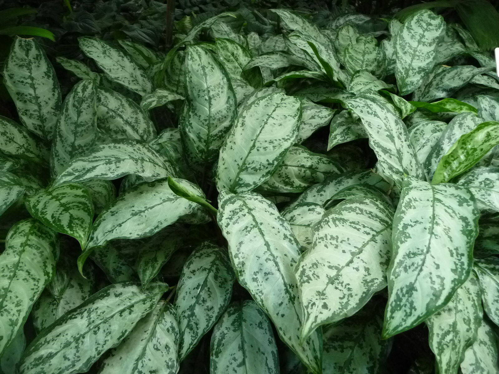 Aglaonema maranthfolium (Hamburgi pálmaház)